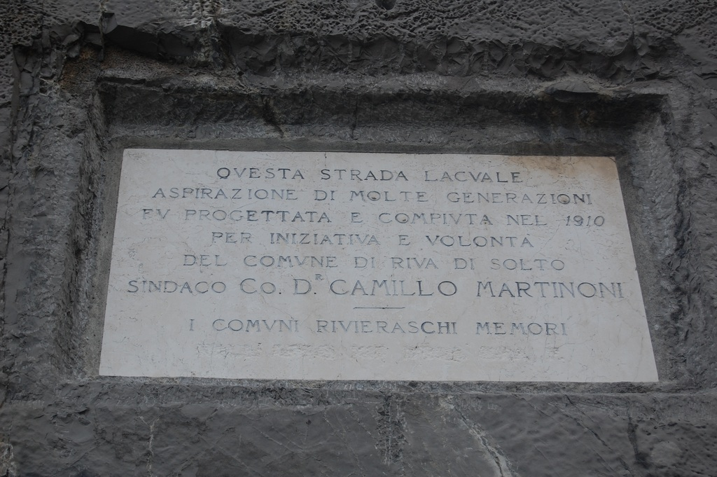 Lapide trovata a Riva di Solto commemorativa della costruzione della ex Strada Statale (ora strada provinciale) 469 Sebina Occidentale. Foto scattata il 9 settembre 2012 QUESTA STRADA LACUALE ASPIRAZIONE DI MOLTE GENERAZIONI FU PROGETTATA E COMPIUTA NEL 1910 PER INIZIATIVA E VOLONTÀ DEL COMUNE DI RIVA DI SOLTO SINDACO Co. Dr CAMILLO MARTINONI I COMUNI RIVIERASCHI MEMORI